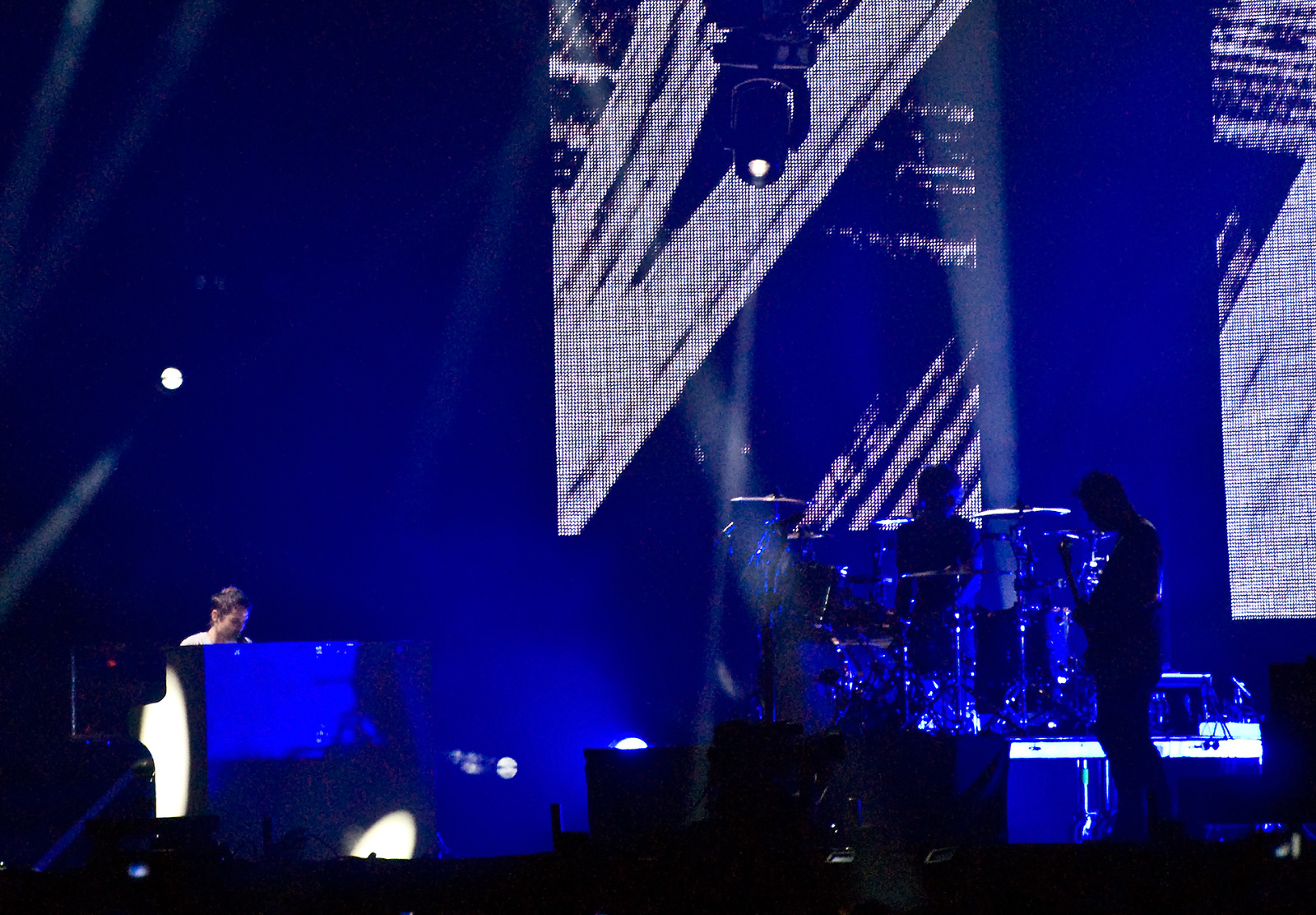 Muse